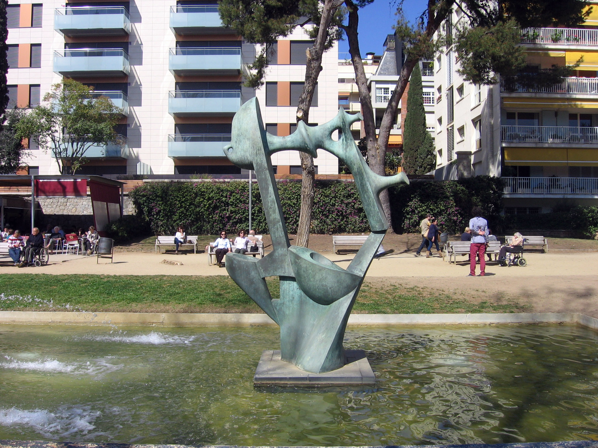 Ingeniería textil (1961), de Ángel Ferrant, en la Plaza de Ferran Casablancas